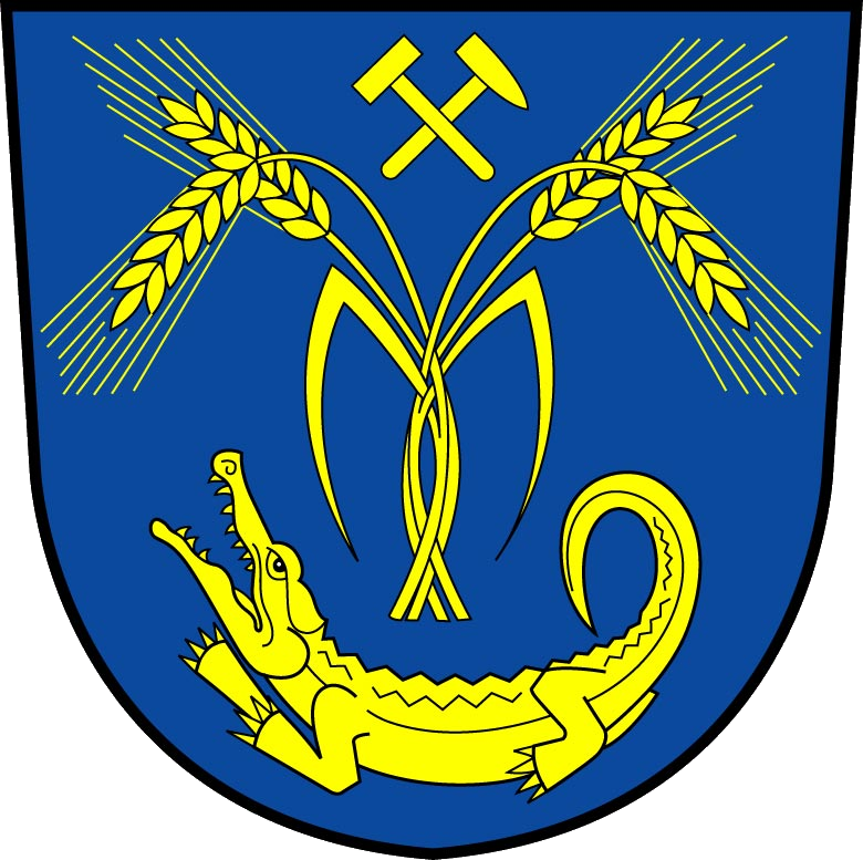 Oficiální znak obce Tlučná.